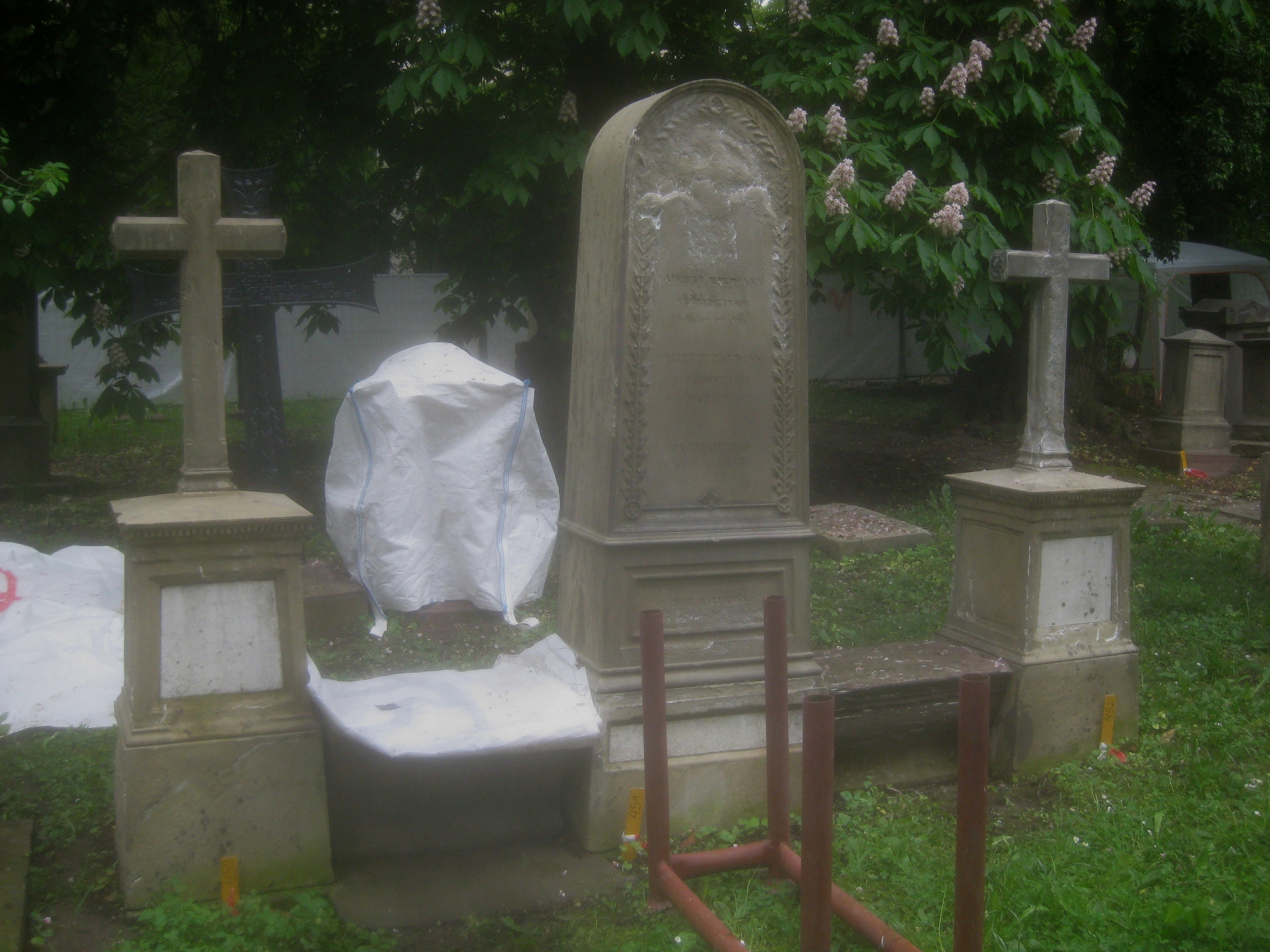 Stuttgart, Hoppenlaufriedhof, Grabmal von August Hartmann und seiner Frau Mariette Hartmann geb. Dannenberger, Julie Hartmann, ihre unverheiratete Tochter, und ihre Tochter Emilie Reinbeck geb. Hartmann und Ihr Ehemann Georg Reinbeck. Das Foto entstand 2016 während der Restaurationsarbeiten an den Grabmälern des Hoppenlaufriedhofs.